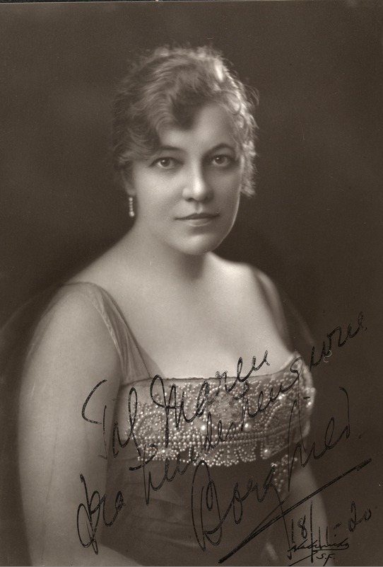 Norsk (bokmål): portrett, kvinne, operasangerinne, brystbilde.